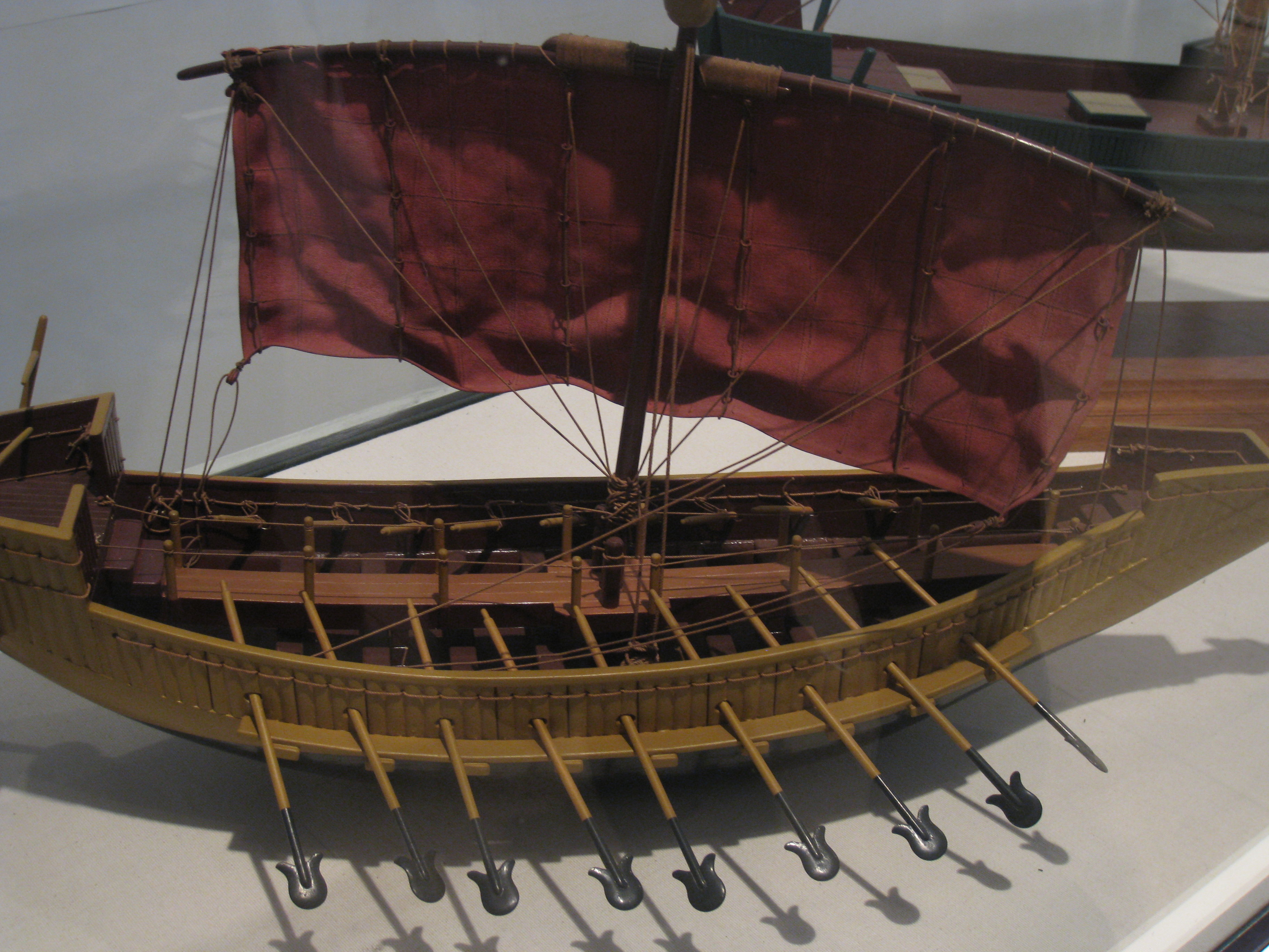 National Maritime Museum, Israel - Ship Models A modern model of an Egyptian warship from 1200 BC. wood. Model built by naval Architect P.Milch and by I. Krupnik המוזיאון הימי הלאומי בחיפה דגמי ספינות דגם מודרני של ספינת מלחמה ממצרים העתיקה. ספינות מסוג זה היו בשימוש בשנת 1200 לפני הספירה. הדגם, מעשה ידי האדריכל הימי פ. מילך ובידי י. קרופניק